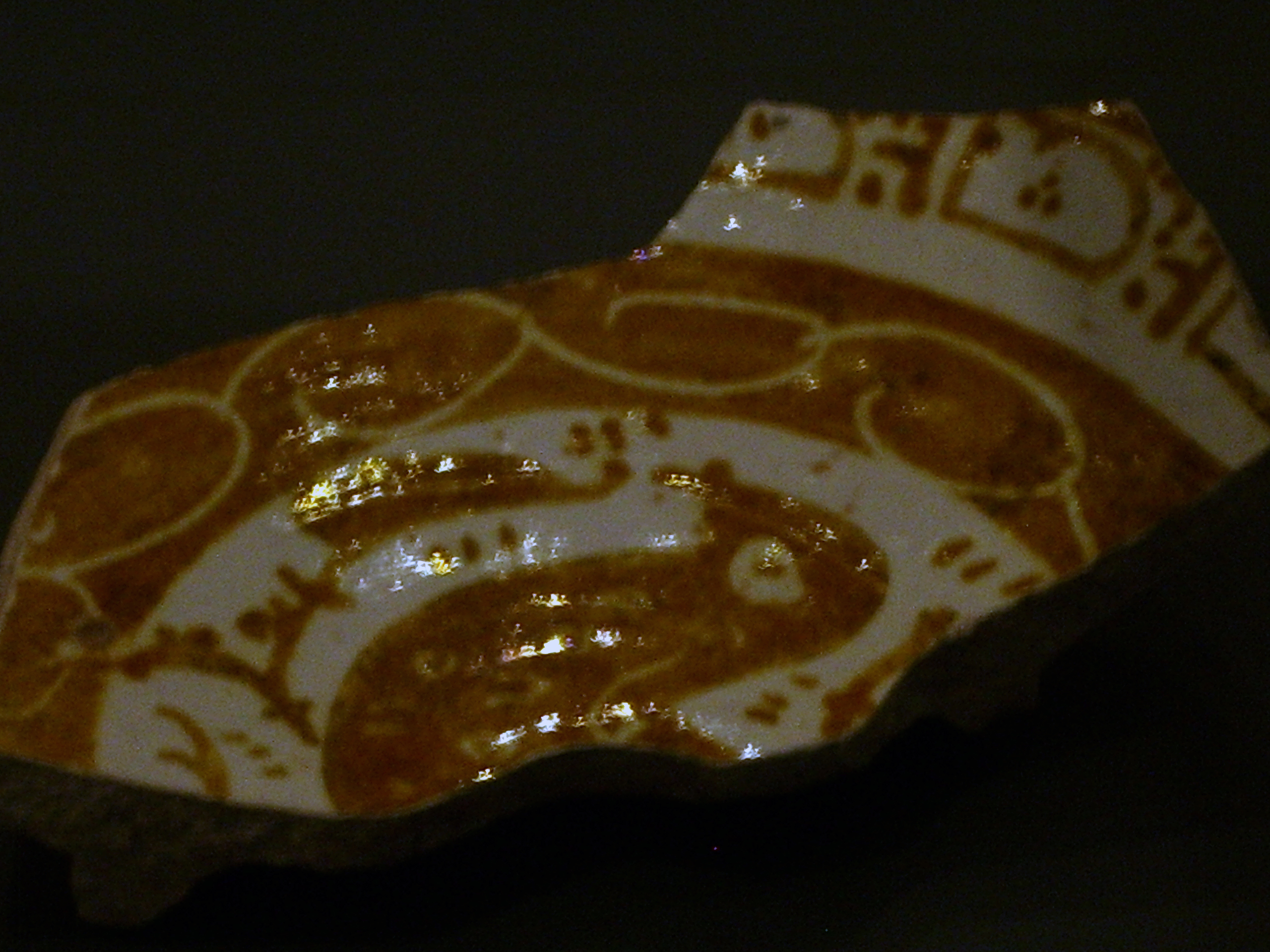 Fragmento de bandeja de loza dorada andalusí proviniente de Zaragoza. Siglo XI. Museo del Teatro Romano de Cesaraugusta